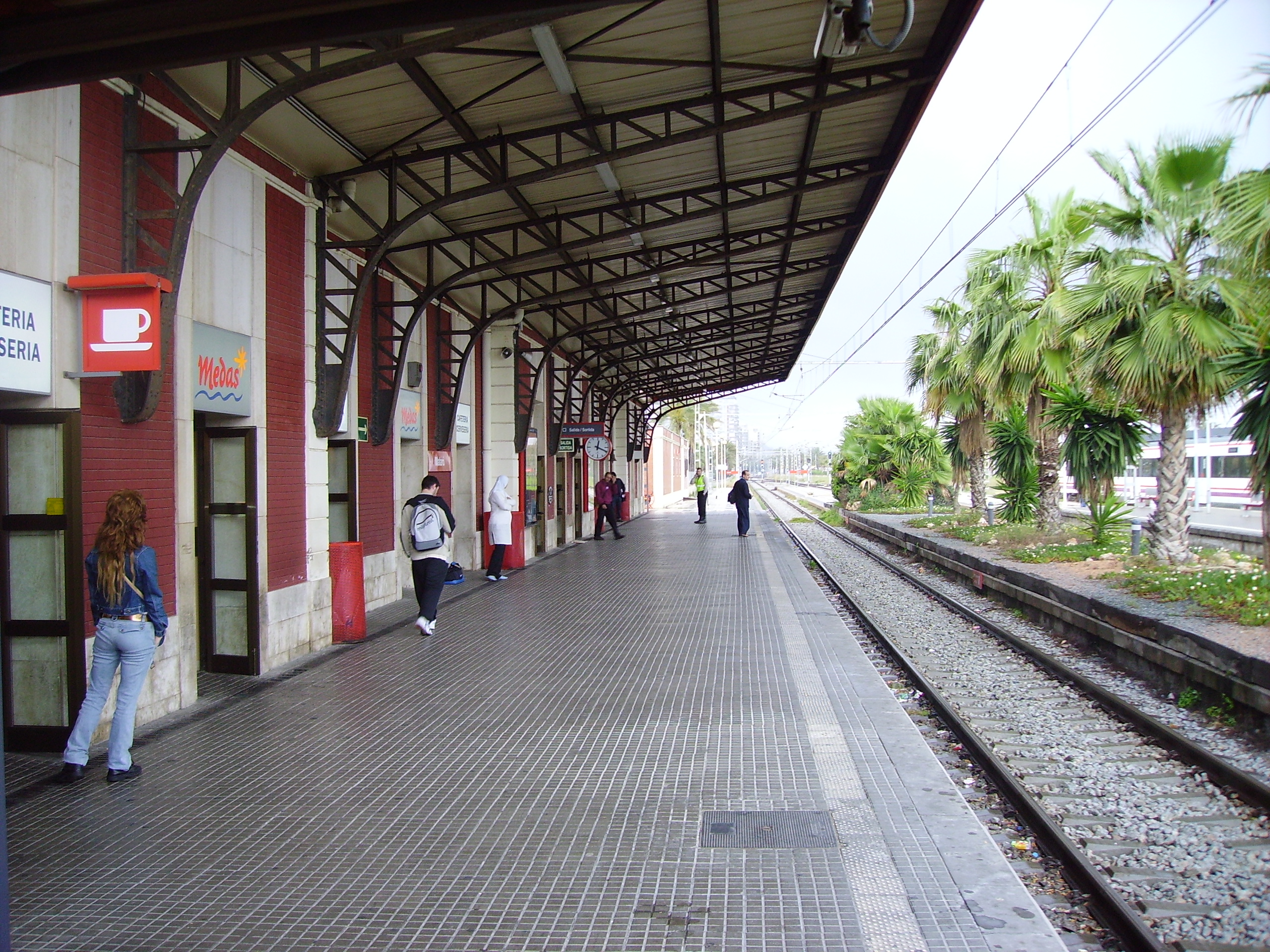 Estació de Mataró, capital de la comarca del Maresme, (Catalunya)